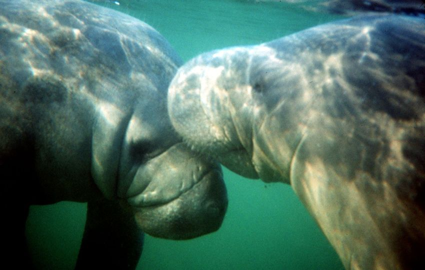 Karibik-Manatis (Trichechus manatus), Florida Keys National Marine Sanctuary